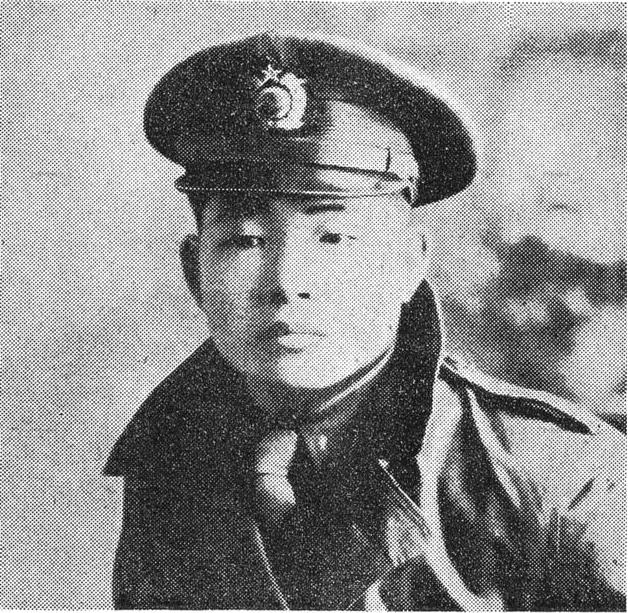 Chun Doo-hwan, 1955-February